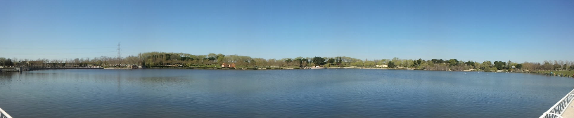 Panorámica de la laguna de Mari Pascuala en el Parque de Polvoranca (Leganés, Madrid, España)